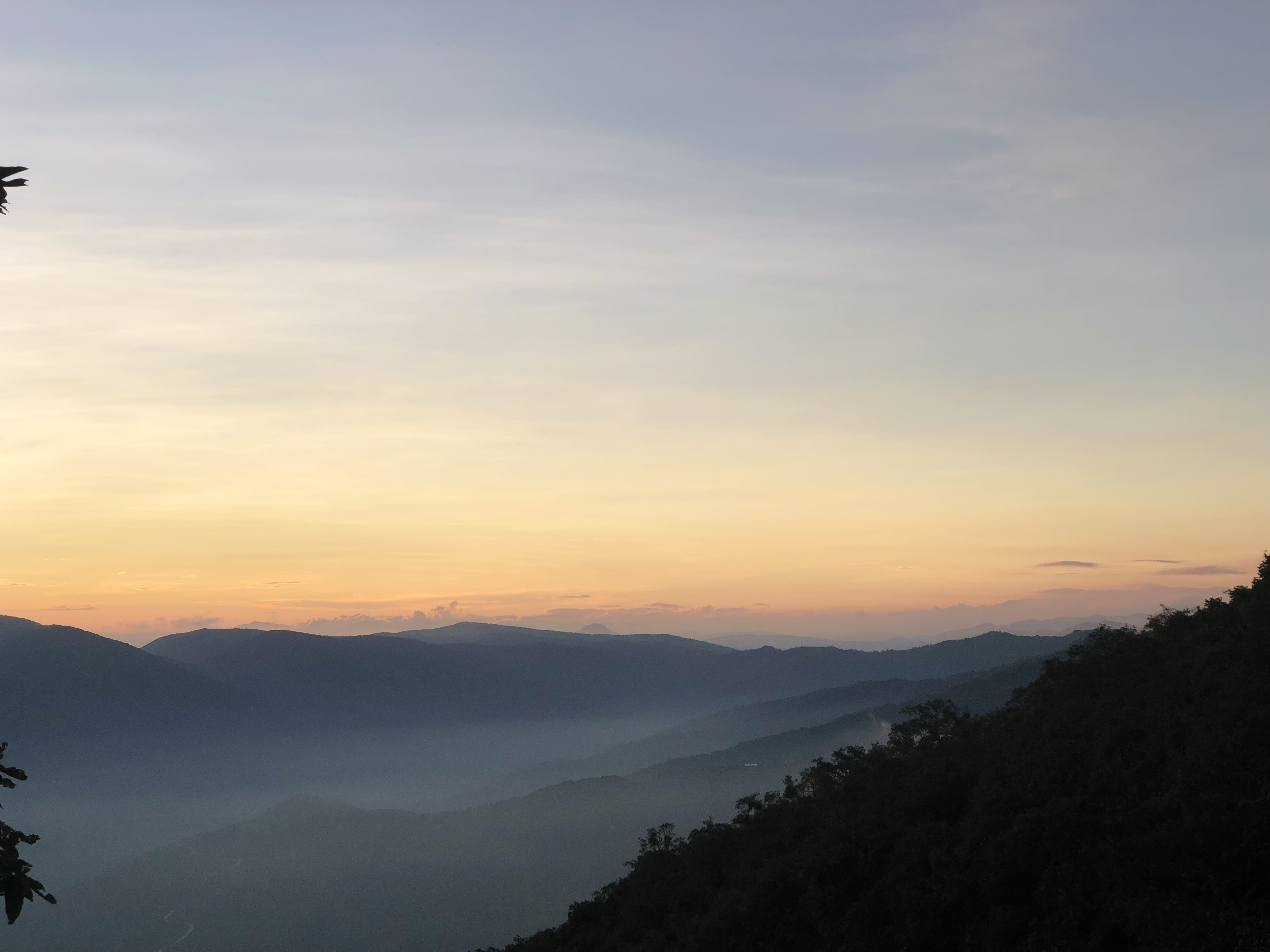 Vista del Sotano de Barro, en sierra gorda